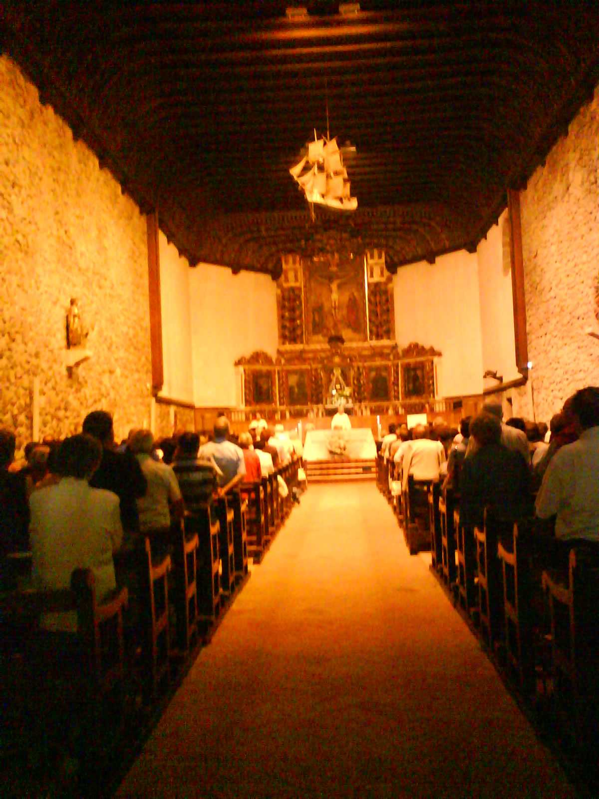 Misa en el santuario de Arrate. País Vasco (España).